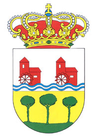 Escudo de Molinicos, en Albacete (España)